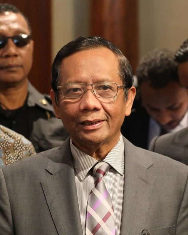 Siara Pers Menko Polhukam Tegaskan Sosialisasi Omnibus Law Sudah Dilaksanakan Sejak Pelantikan Presiden